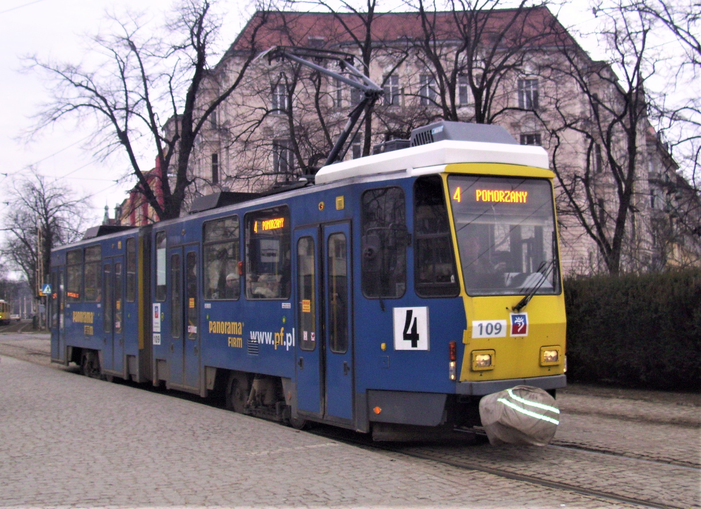 Tramwaj typu Tatra KT4DtM w Szczecinie, 2011 r.